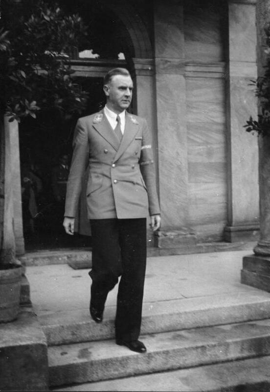 Dr. Bodo Lafferentz Scherl / Heinrich Hoffmann-Presse Informationen: Dr. Lafferentz, der Leiter des Amtes für Reisen, Wandern und Urlaub in der DAF in Bayreuth. 23.Juli 1940 [Herausgabedatum] Abgebildete Personen: Lafferentz, Bodo Dr.: Leiter der NS-Gemeinschaft Kraft durch Freude (KdF), Deutschland